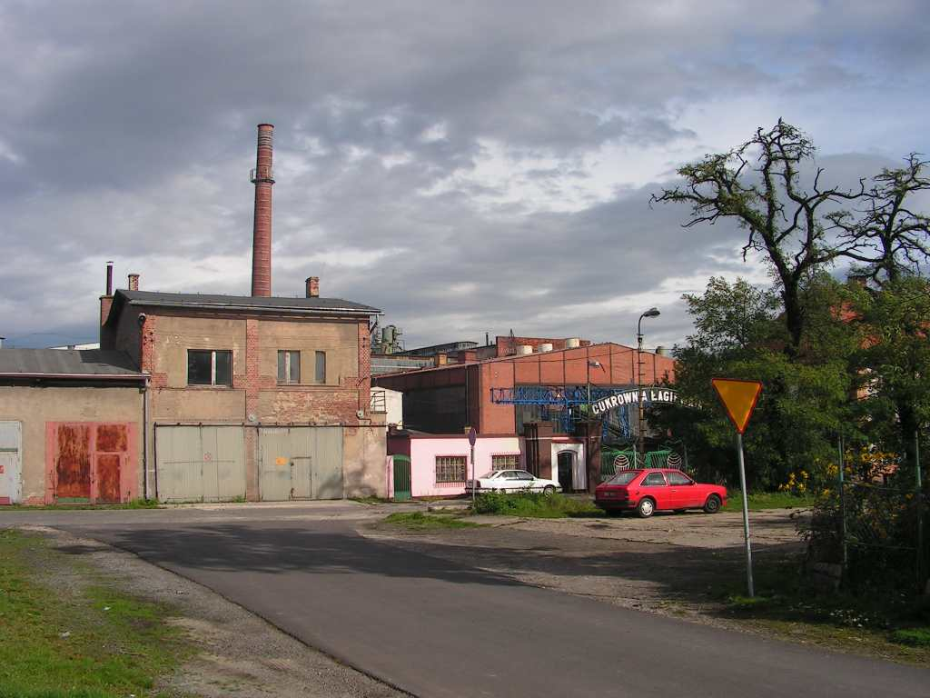 Cukrownia w Łagiewnikach (powiat dzierżoniowski)